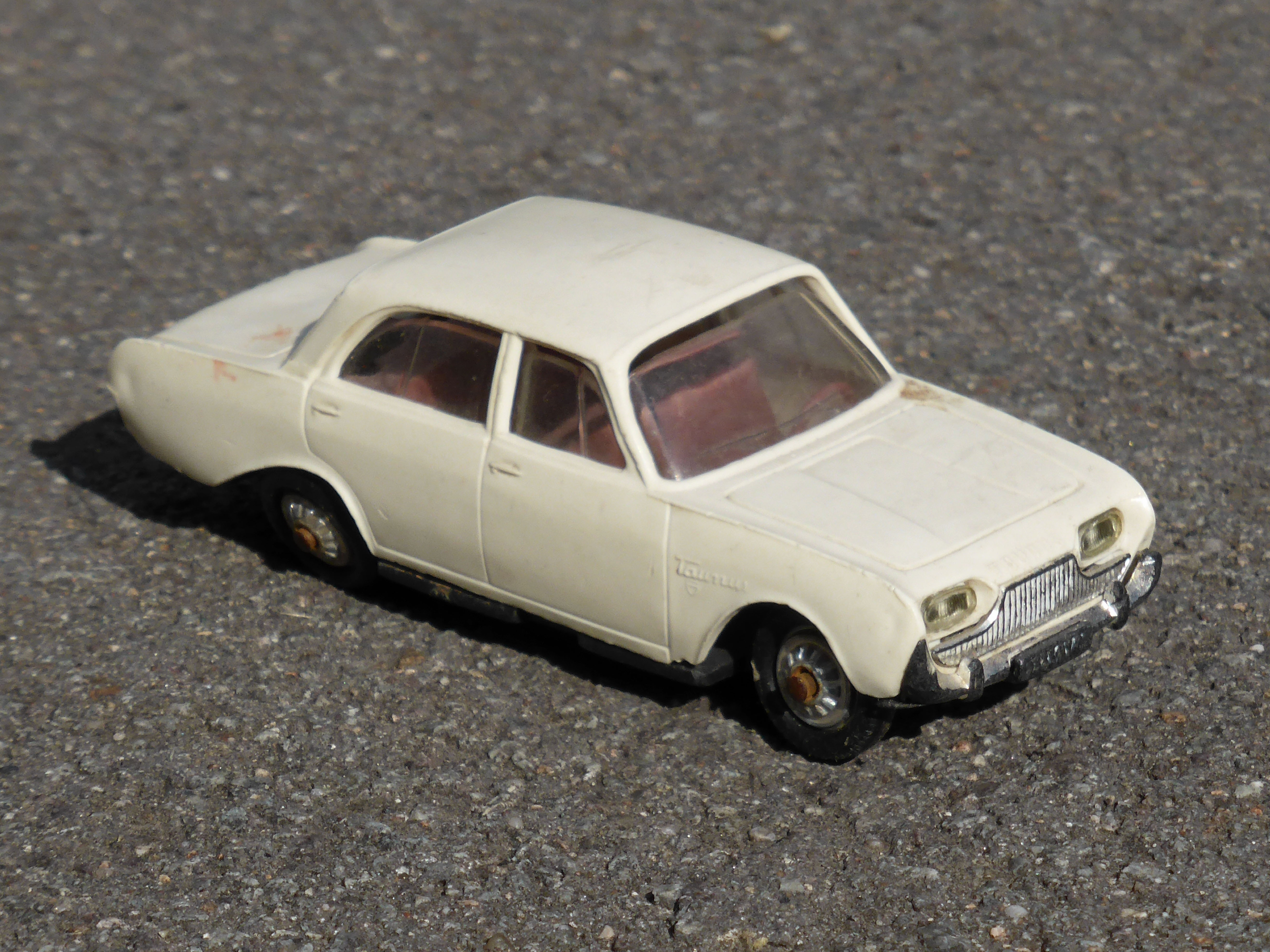 Modellauto "Ford Taunus 17M" im Maßstab 1:43 von Norev aus den 1960er Jahren.